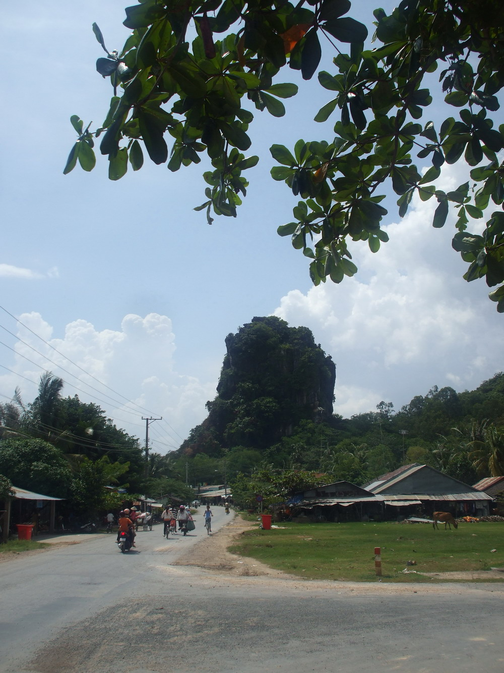 Núi Thạch Động (Hà Tiên) nhìn từ xa.